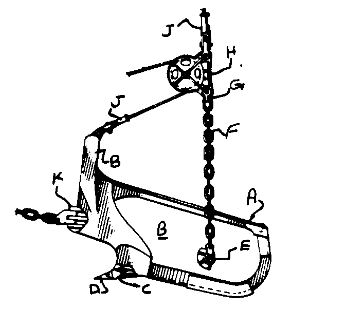 Dragline bucket